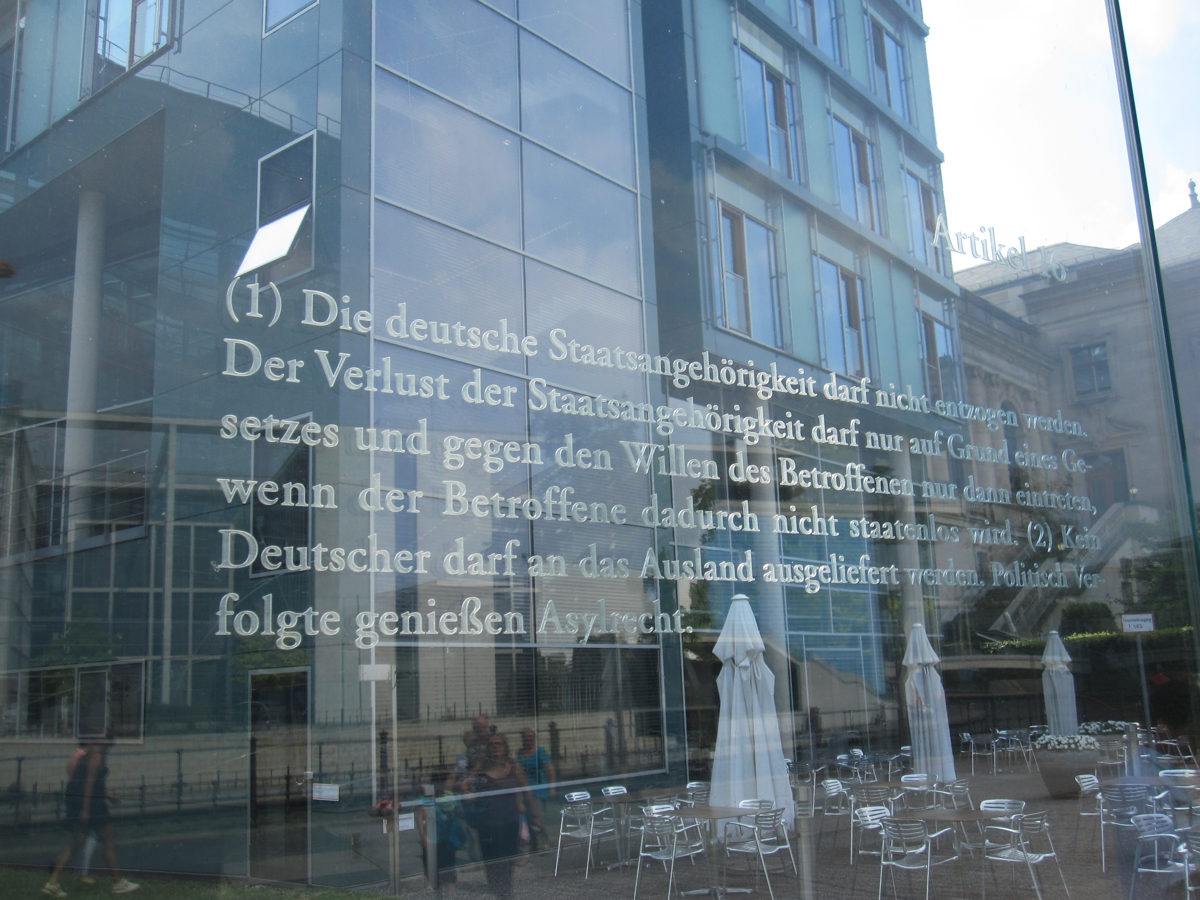 Bundestagsgebäude in Berlin: Der israelische Künstler Dani Karavan hat in drei Meter hohe Glasscheiben, die einen Außenhof des Jakob-Kaiser-Hauses im Uferbereich zur Spree begrenzen, die 19 Grundrechtsartikel des Grundgesetzes mit Laser eingraviert. „Die Grundrechtsartikel schweben gleichsam in Augenhöhe vor dem Haus der Fraktionen, dem Jakob-Kaiser-Haus“ (Andreas Kaernbach, Deutscher Bundestag).